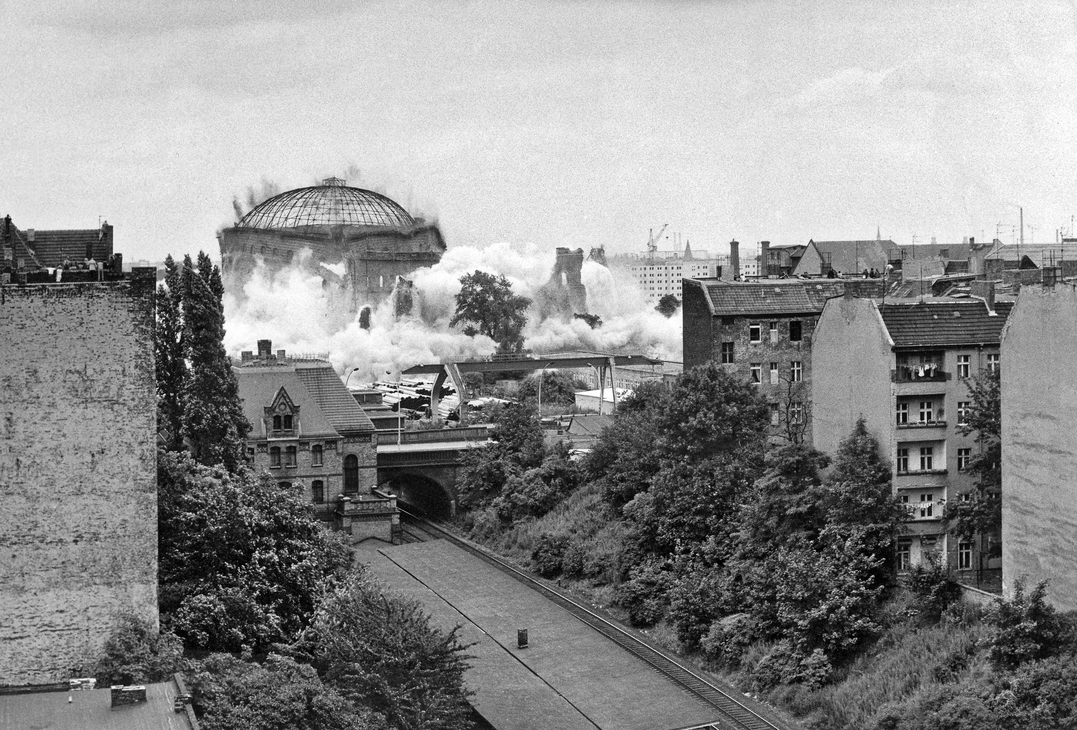 Sprengung der 3 Gasspeicher, Gasometer, Behälter